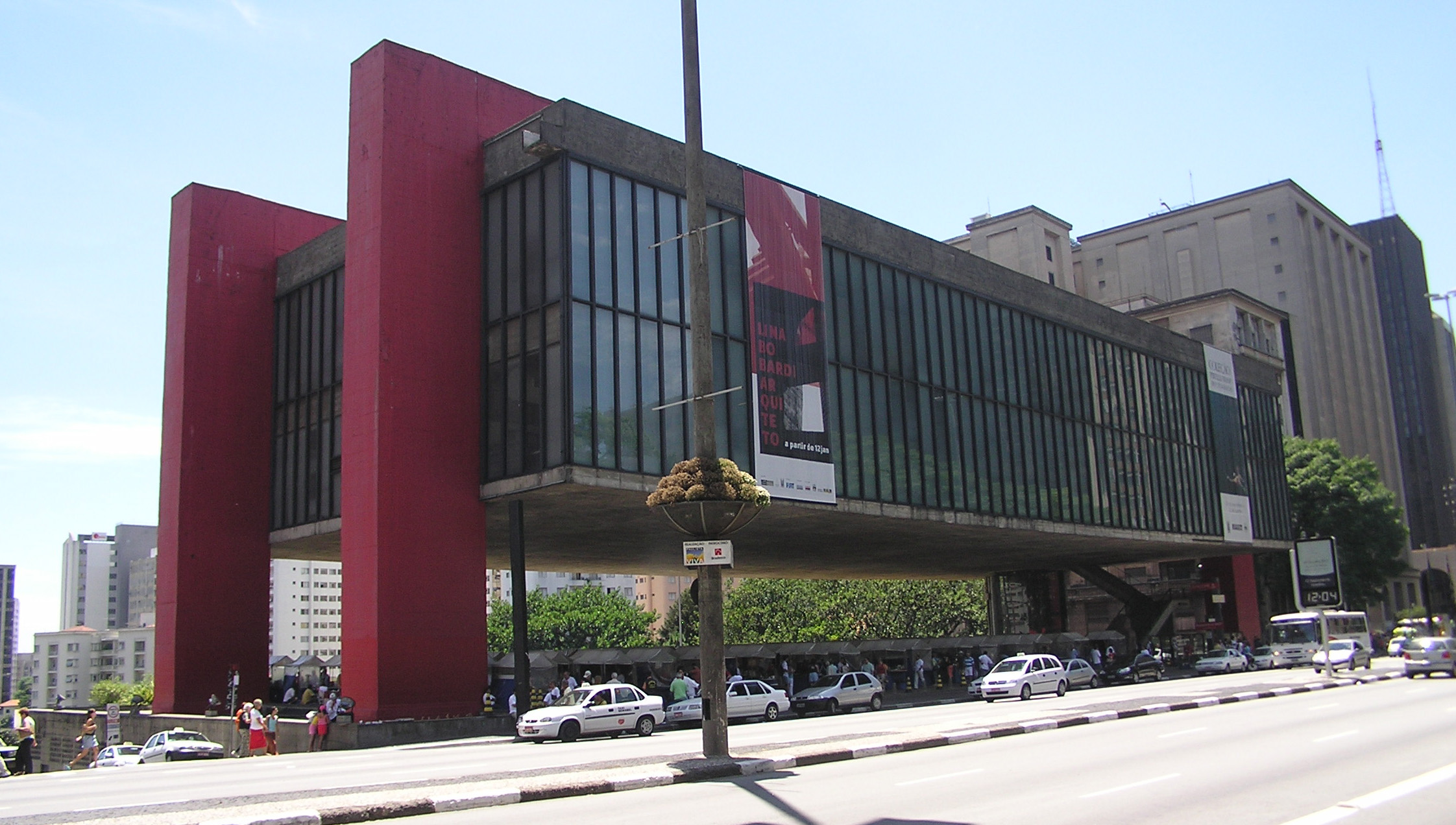 Museu de Arte de São Paulo(MASP)